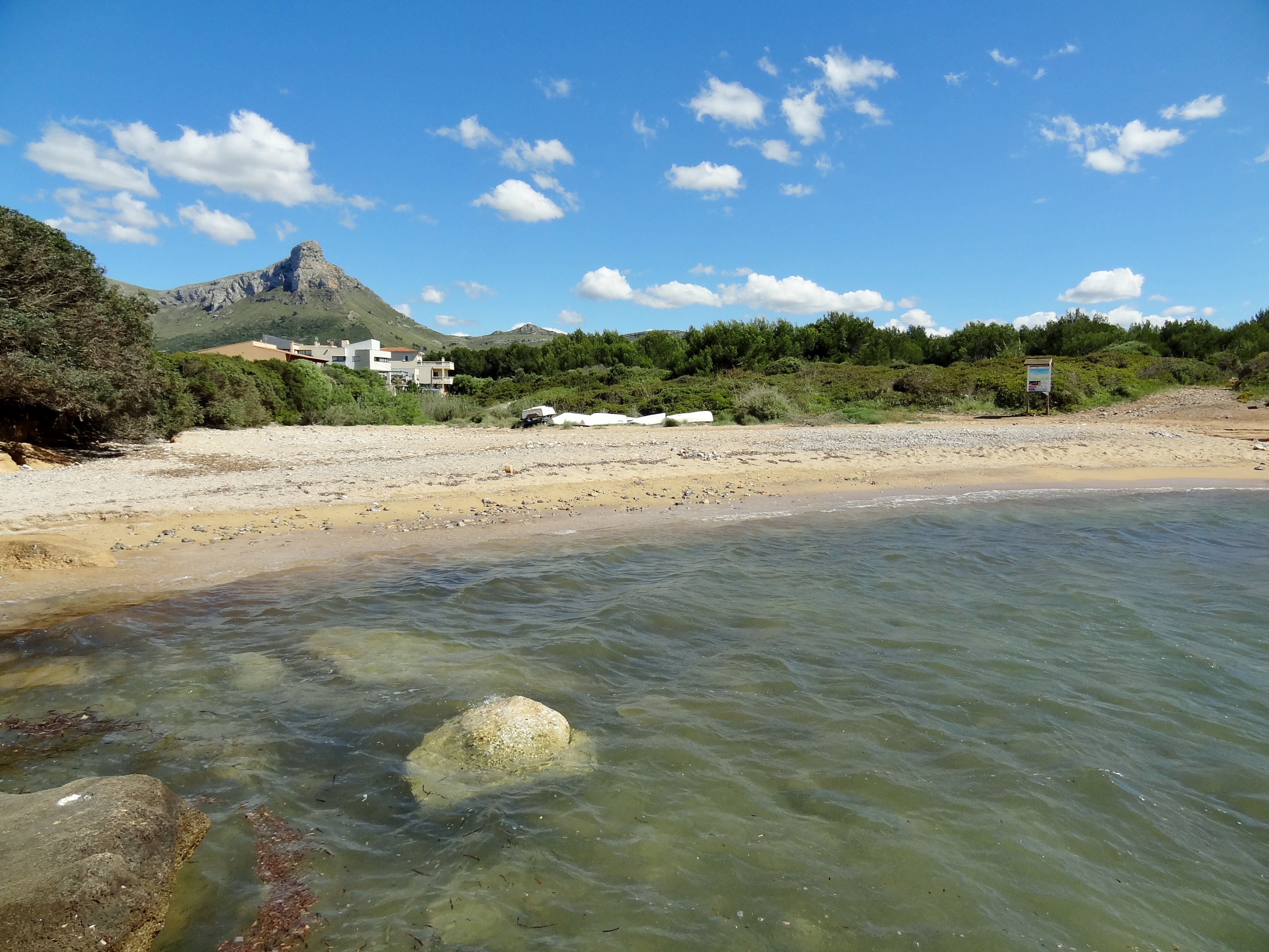 Platja de s’Estanyol, Strand in der Gemeinde Artà, Mallorca, Spanien